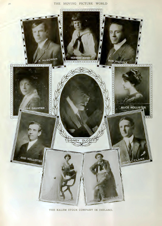 1911, Kalem envoie une troupe d'acteurs pour tourner une série de films en Irlande dirigée par Sidney Olcott.